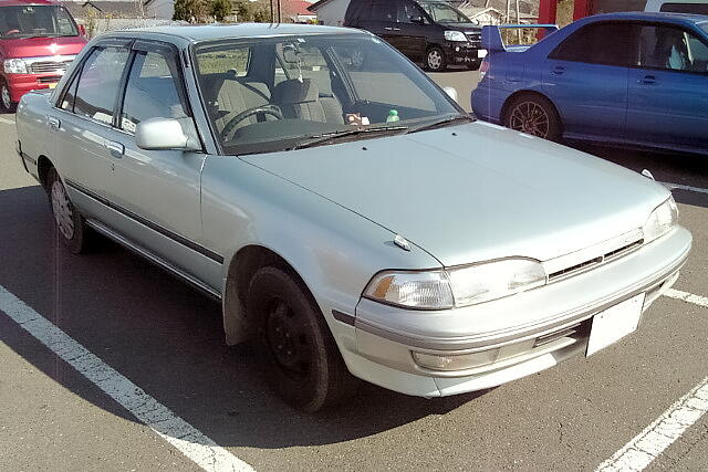 トヨタ・カリーナ（5代目・後期型）